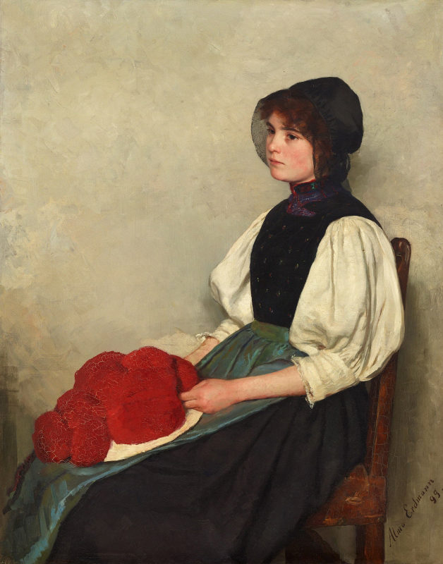 Schwarzwälderin - Staatliche Museen zu Berlin, Nationalgalerie